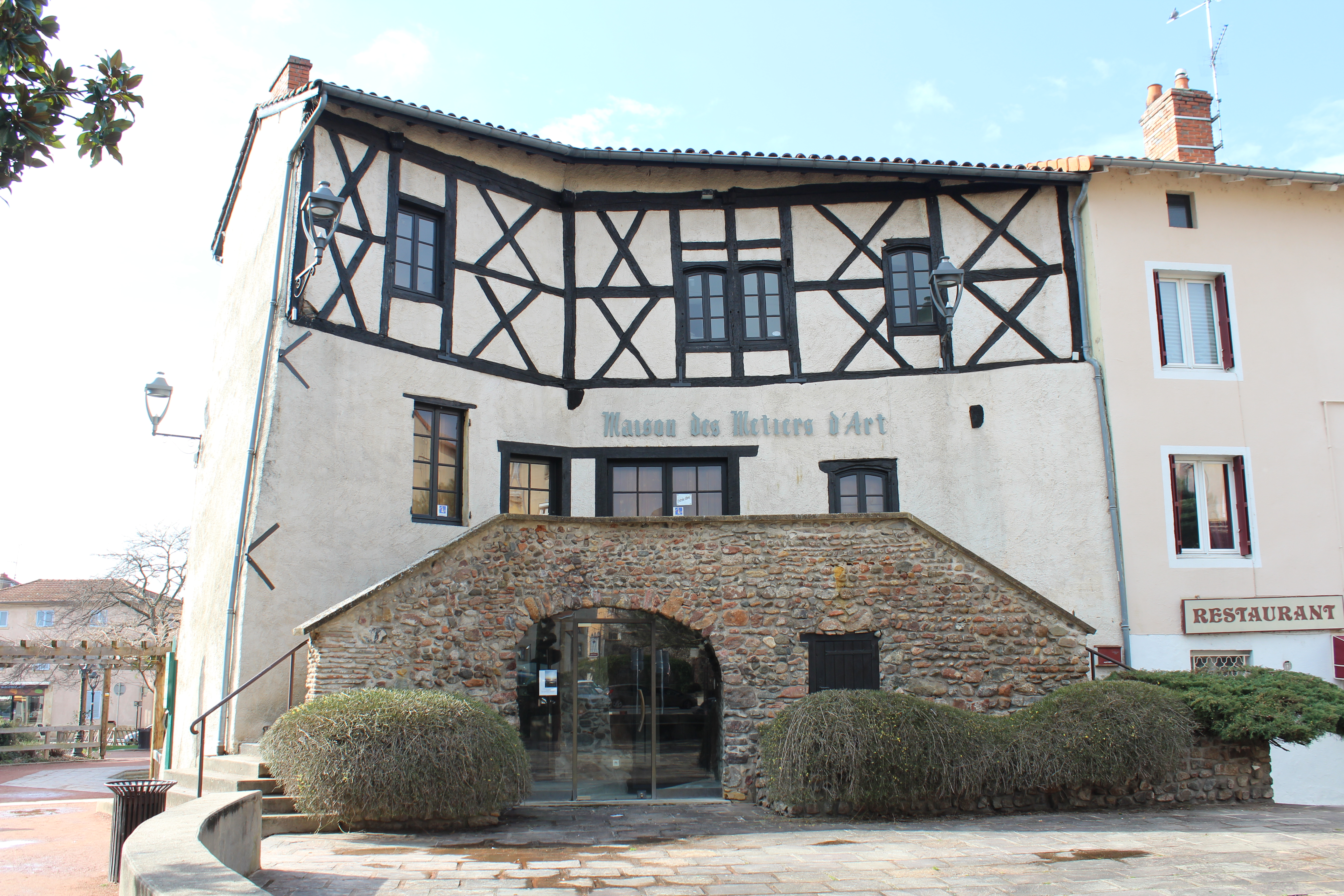 Maison des Métiers d'Art, Roanne.